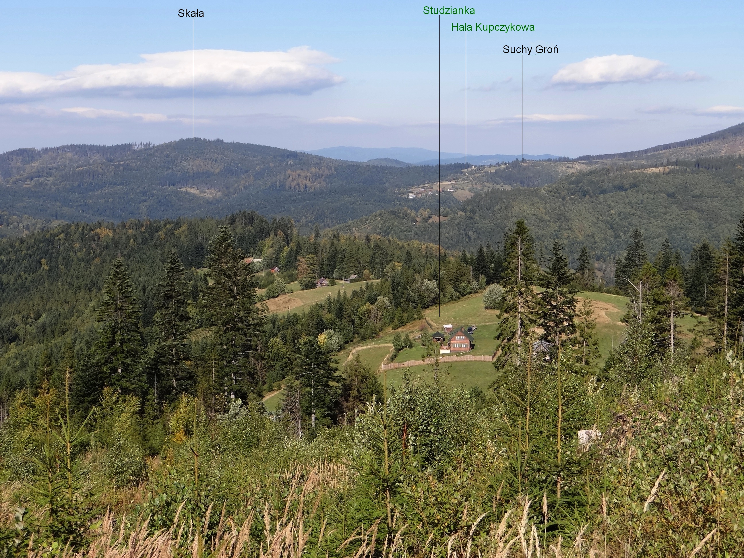 Widok z Hali Cukierniczej